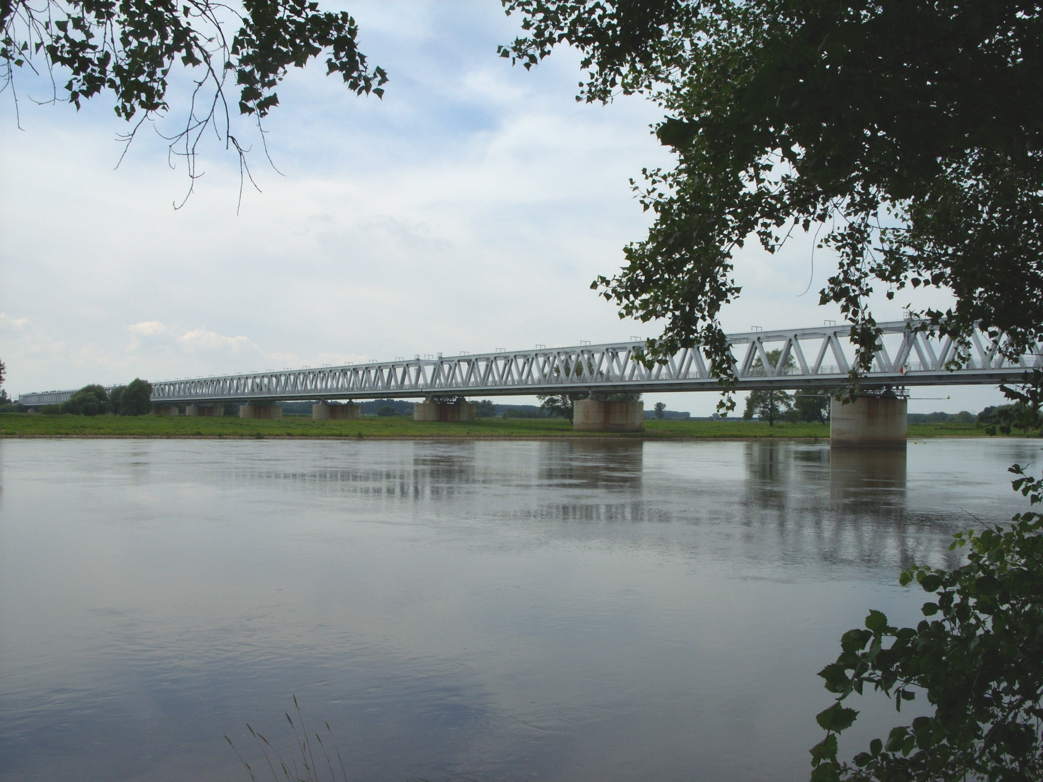 Eisenbahnbrücke Wittenberge